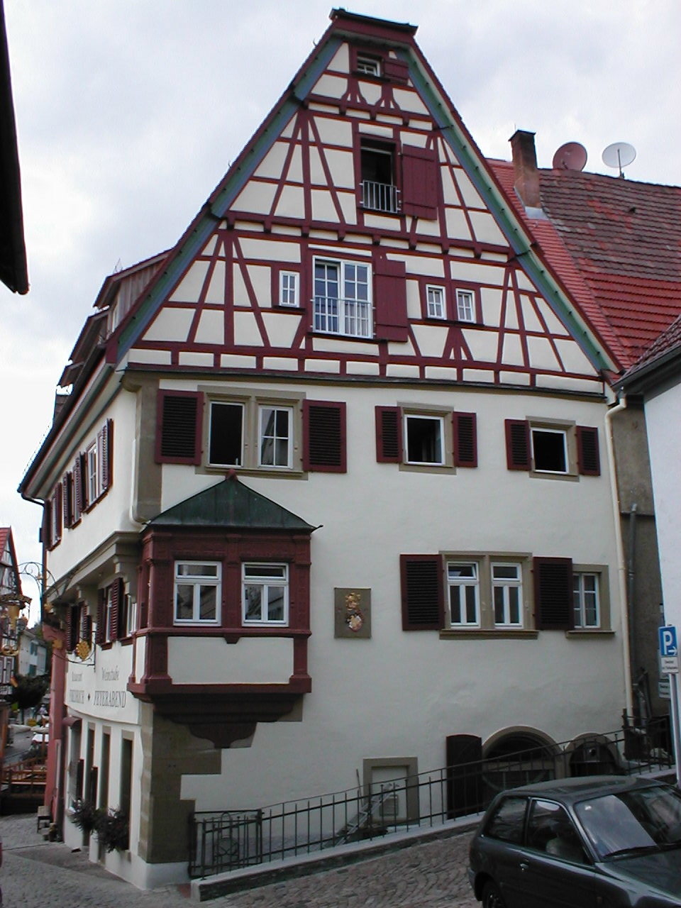 Haus Feyerabend in Bad Wimpfen, mit historischem Erker